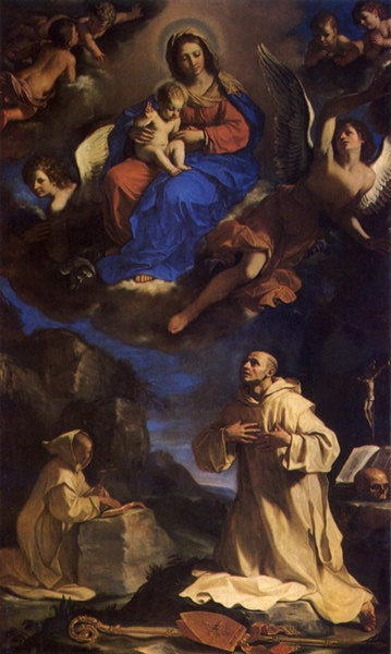 San Bruno in adorazione della Madonna col Bambino in gloria, ol/tl, 392 x 233 cm, Bologna, Pin. Naz.